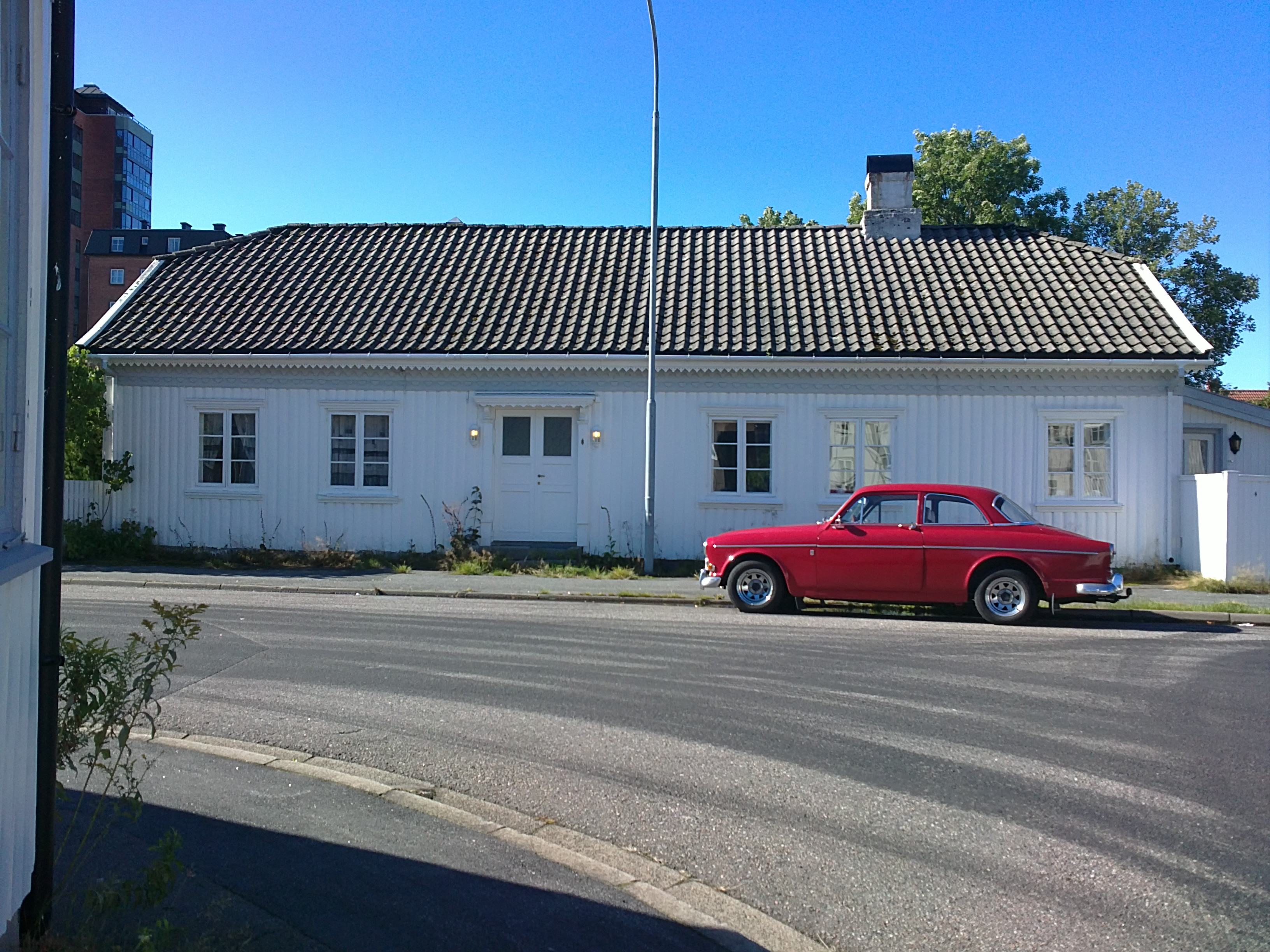 Bilde av "Hausmanngården" på Torstrand